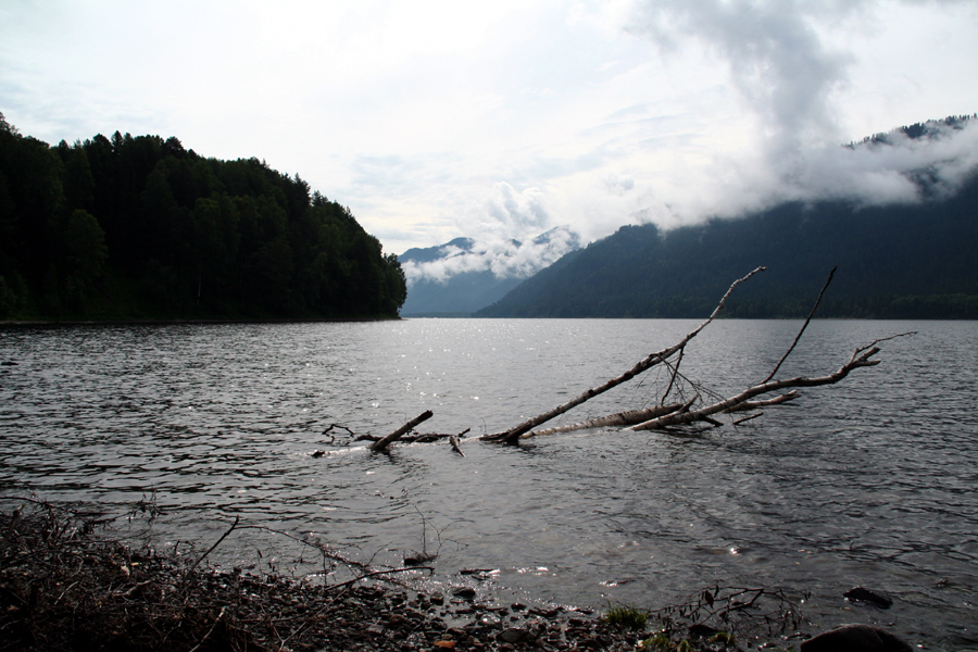 Altay mountains (Lake of Teletskoye), Photo by Vít Hněvkovský, 2006 Altaj (Tělecké jezero)